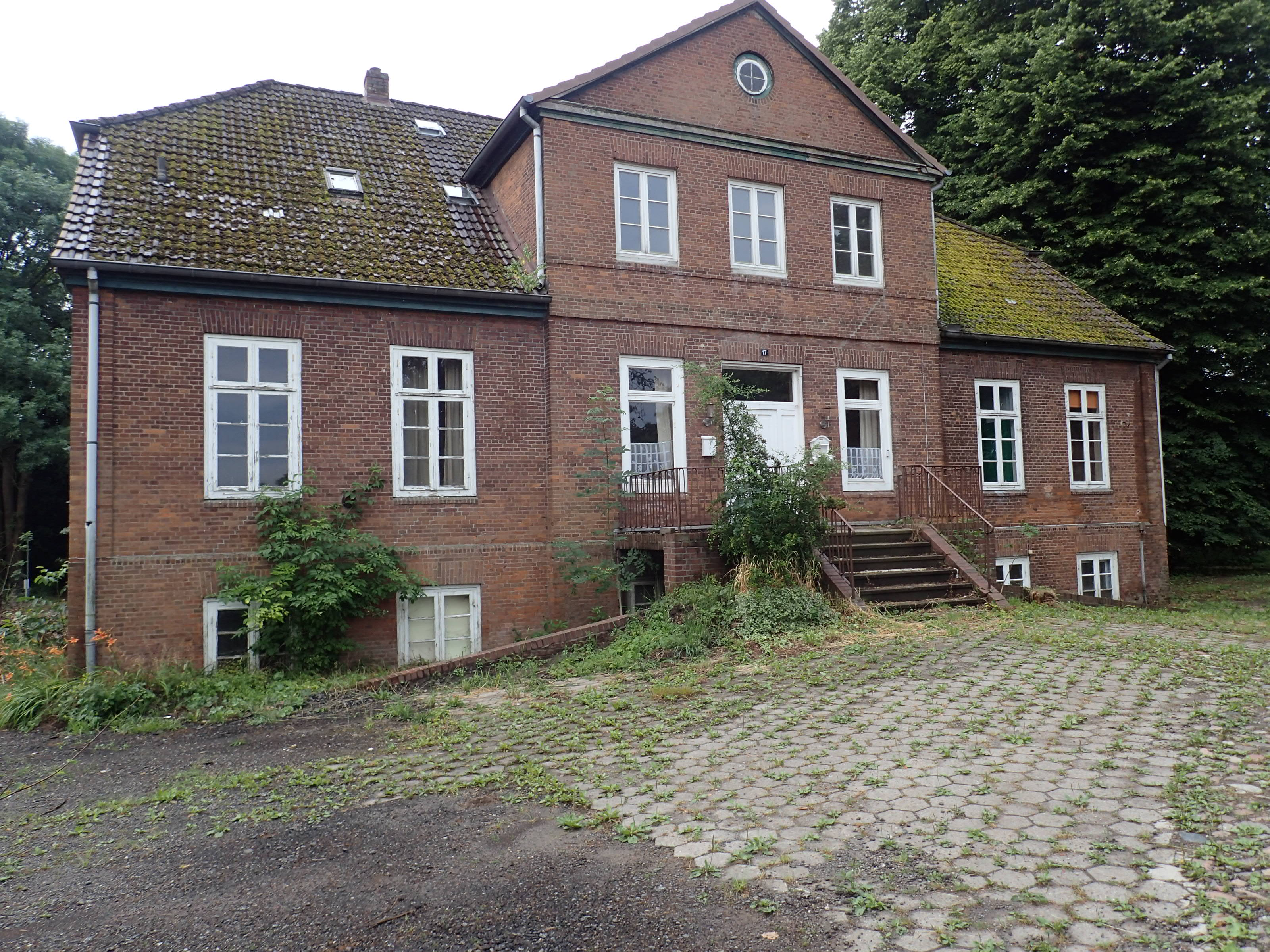 Verwalterhaus auf der Domäne Riepenburg von 1853, Nordeingang; Hamburg Kirchwerder; Kraueler Hauptdeich 17; erbaut nach Plänen des Baumeisters Johann Hermann Maack und des Ratszimmermanns Fetterlein